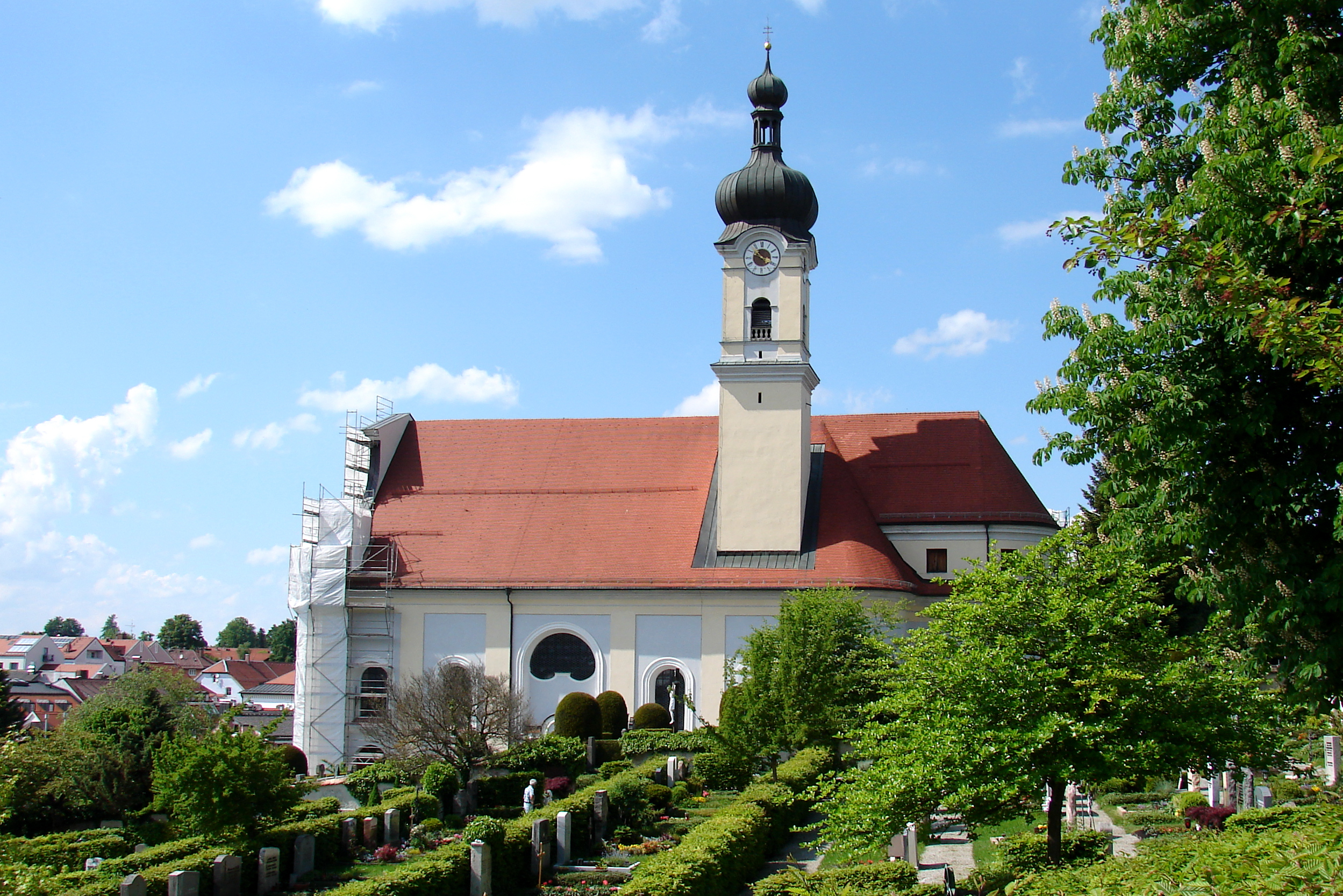 Barocker überkuppelter Acht-Arkadenraum mit vorgesetztem dreischiffigem Emporenjoch, zentralisierender Choranlage und südöstlichem Zwiebelturm, Langhaus 1717-21, Chor 1725-27, 1730-32 Turmerhöhung auf gotischem Unterbau; mit Ausstattung.